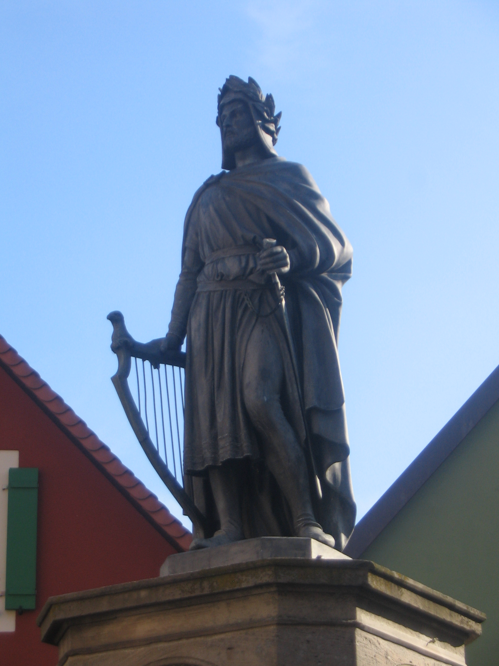 A monument of Wolfram von Eschenbach in Wolframs-Eschenbach. Built 1860/61